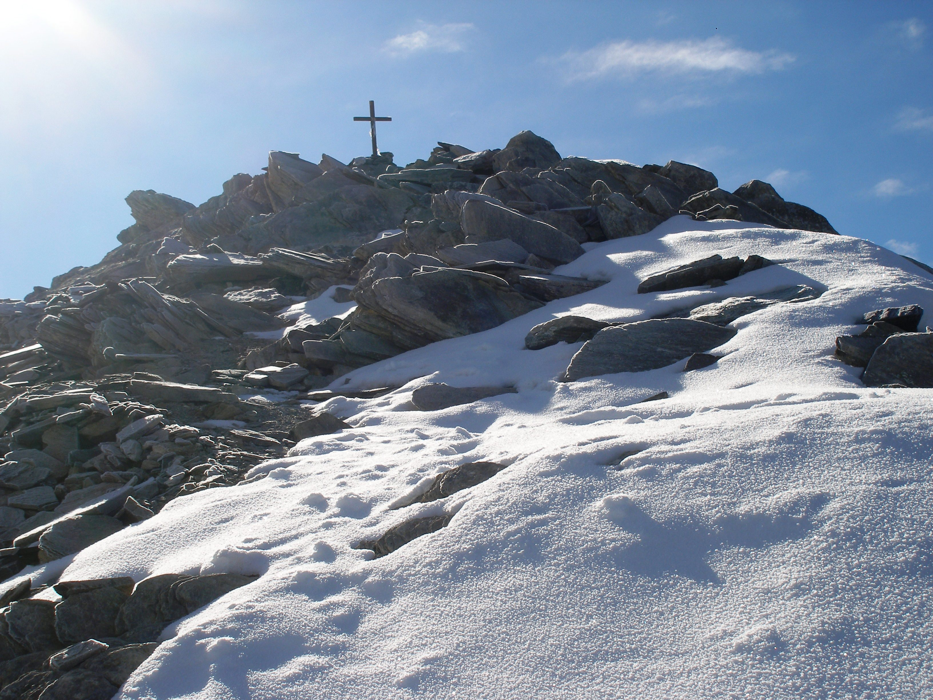 La vetta della montagna con la croce posta sulla sommità.